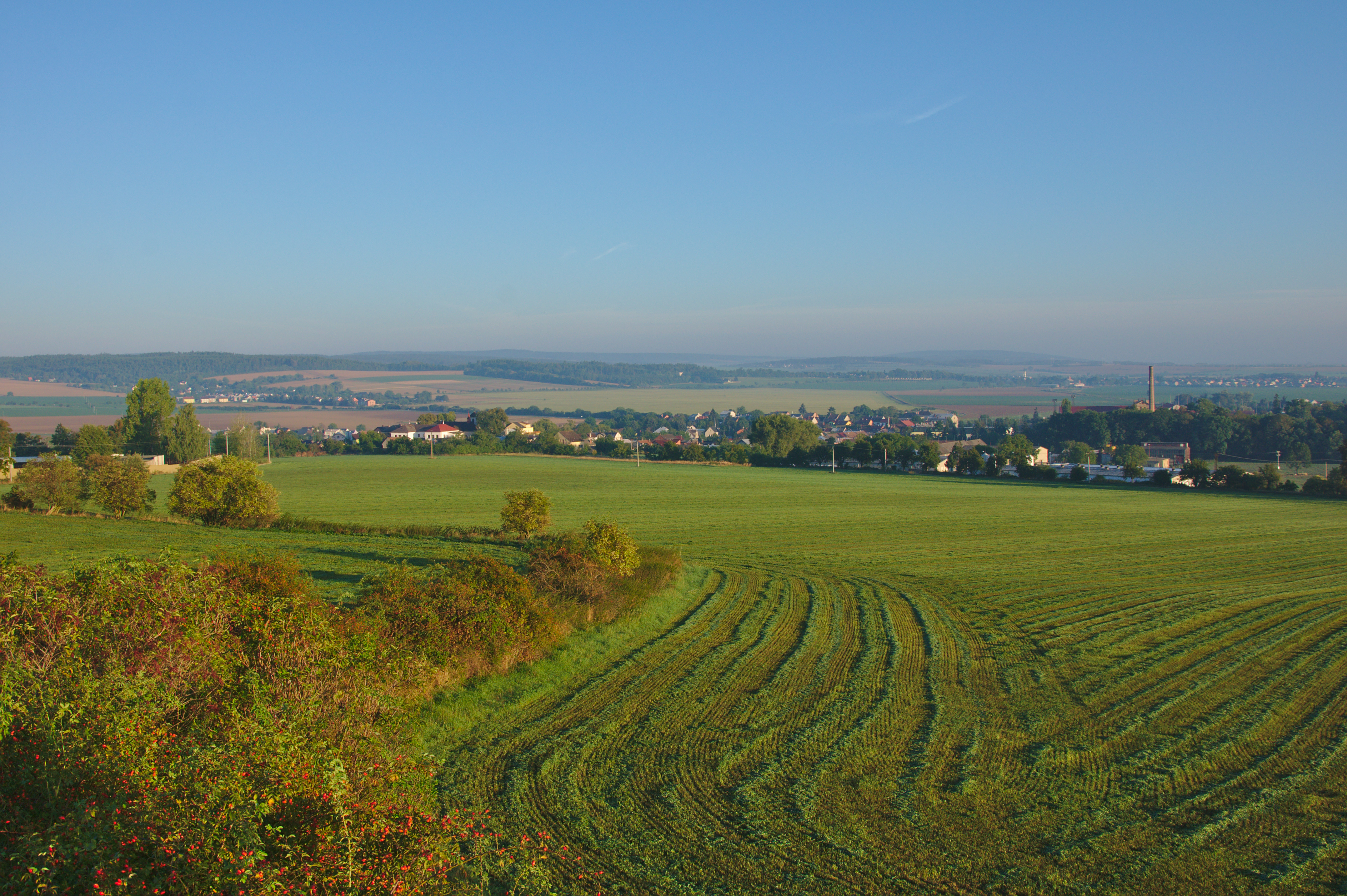 Pohled na obec od jihu, Drahanovice, okres Olomouc